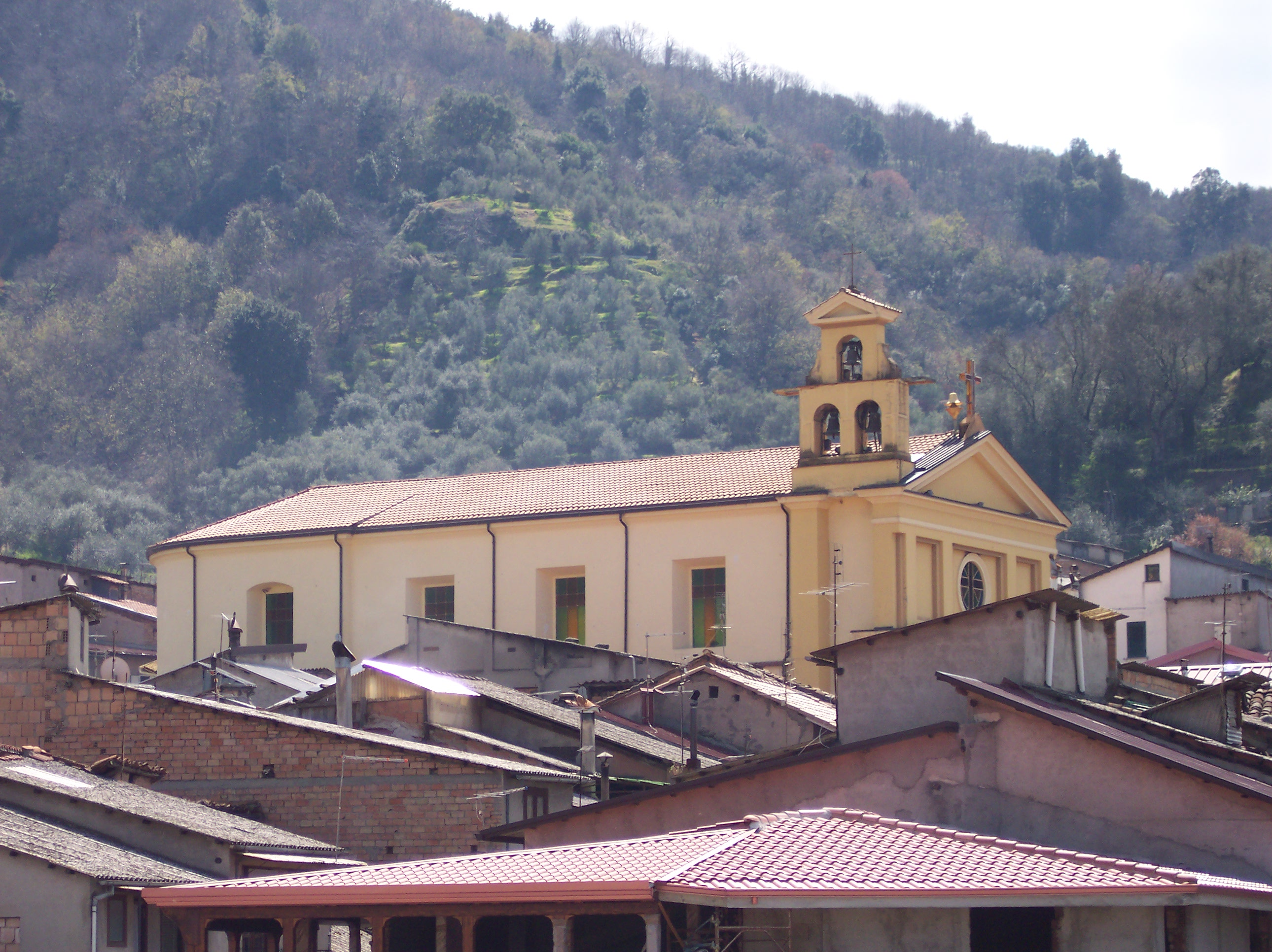 La chiesa grande di Acquaro